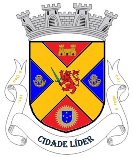 Escudo de Armas do Distrito de Cidade Líder, São Paulo, Brasil